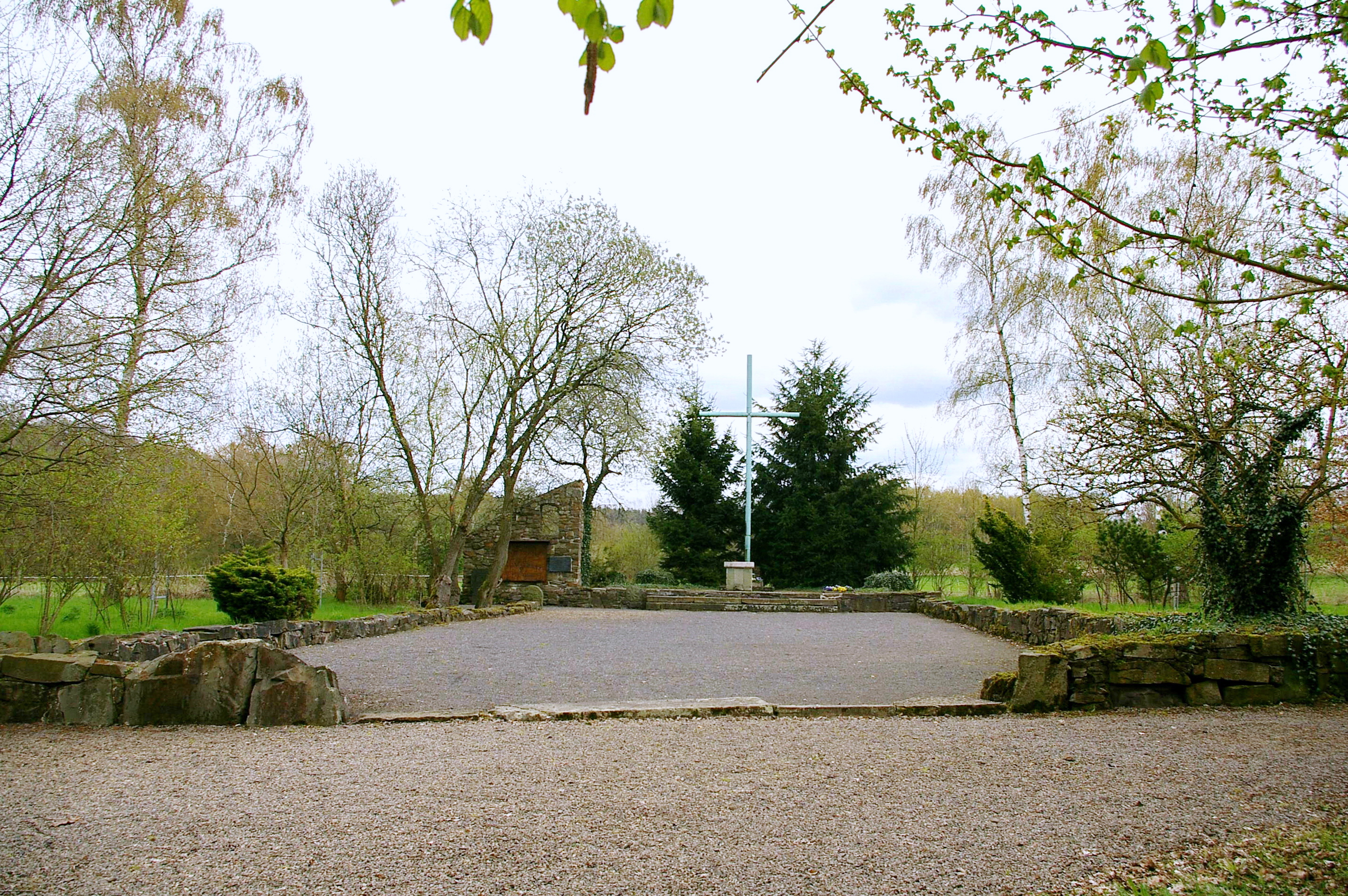 Gedenkstätte am ehemaligen Kloster Himmelpforten, das am 17. Mai 1943 durch die Flutwelle der bombardierten Möhnetalsperre zerstört wurde.